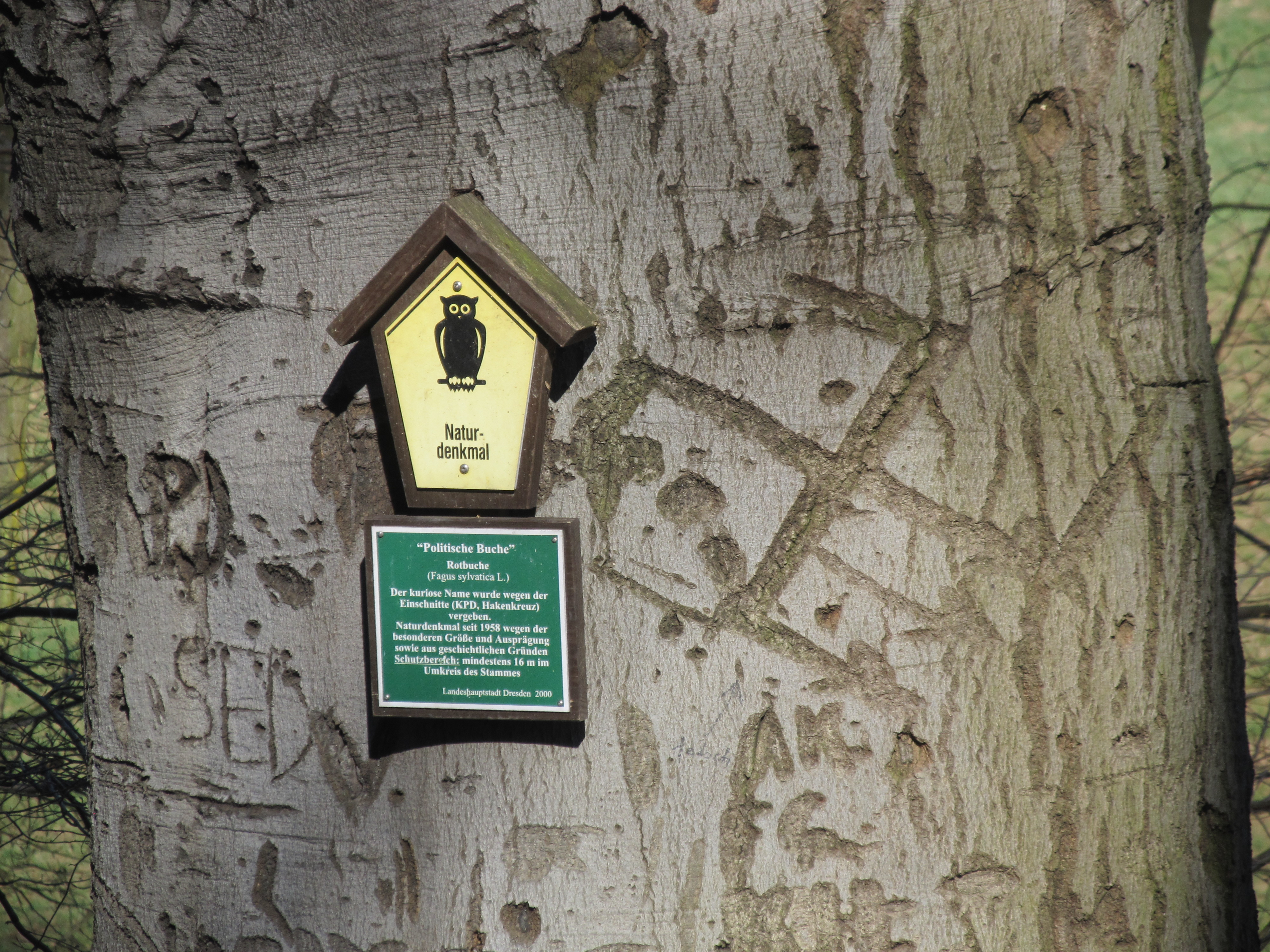 Naturdenkmal Politische Buche im Kleditschgrund, Dresden, im April 2018 (nach Kronenbruch im Herbst 2017)